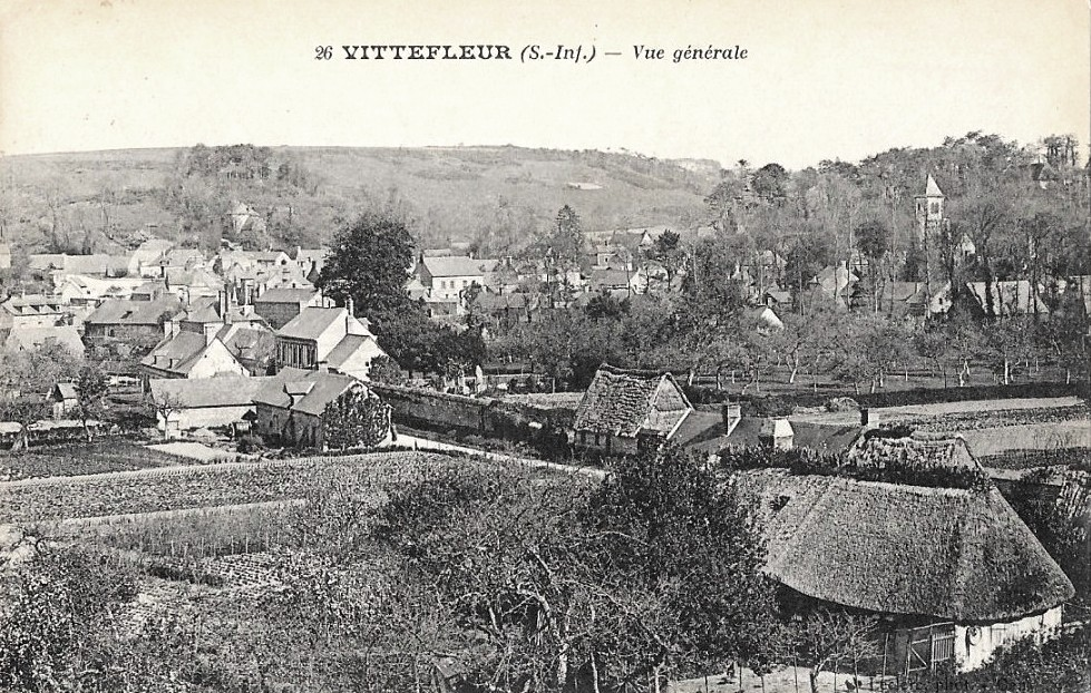 carte postale du village vers 1930.